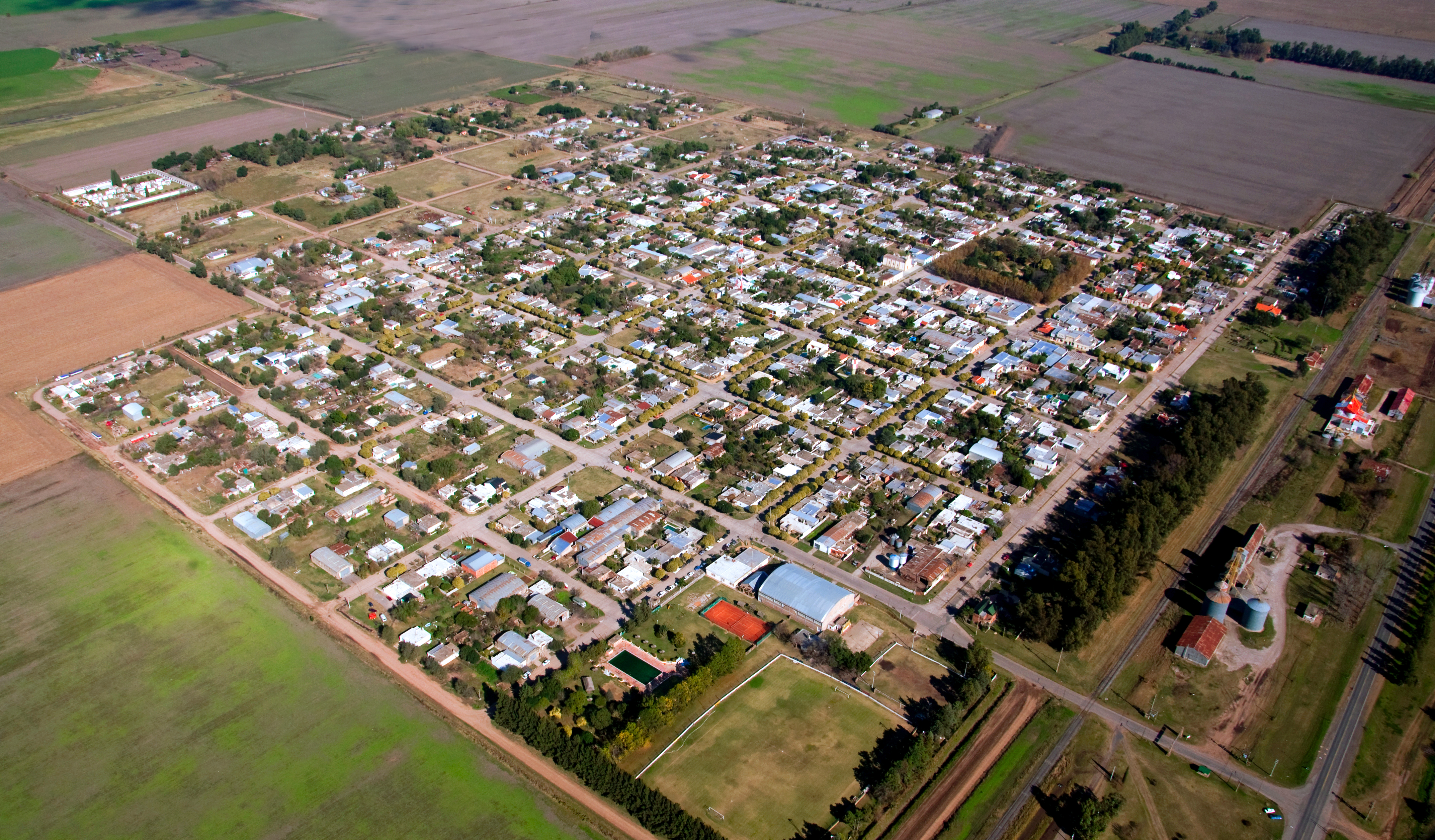 Fotografia aerea de Villa Mugueta